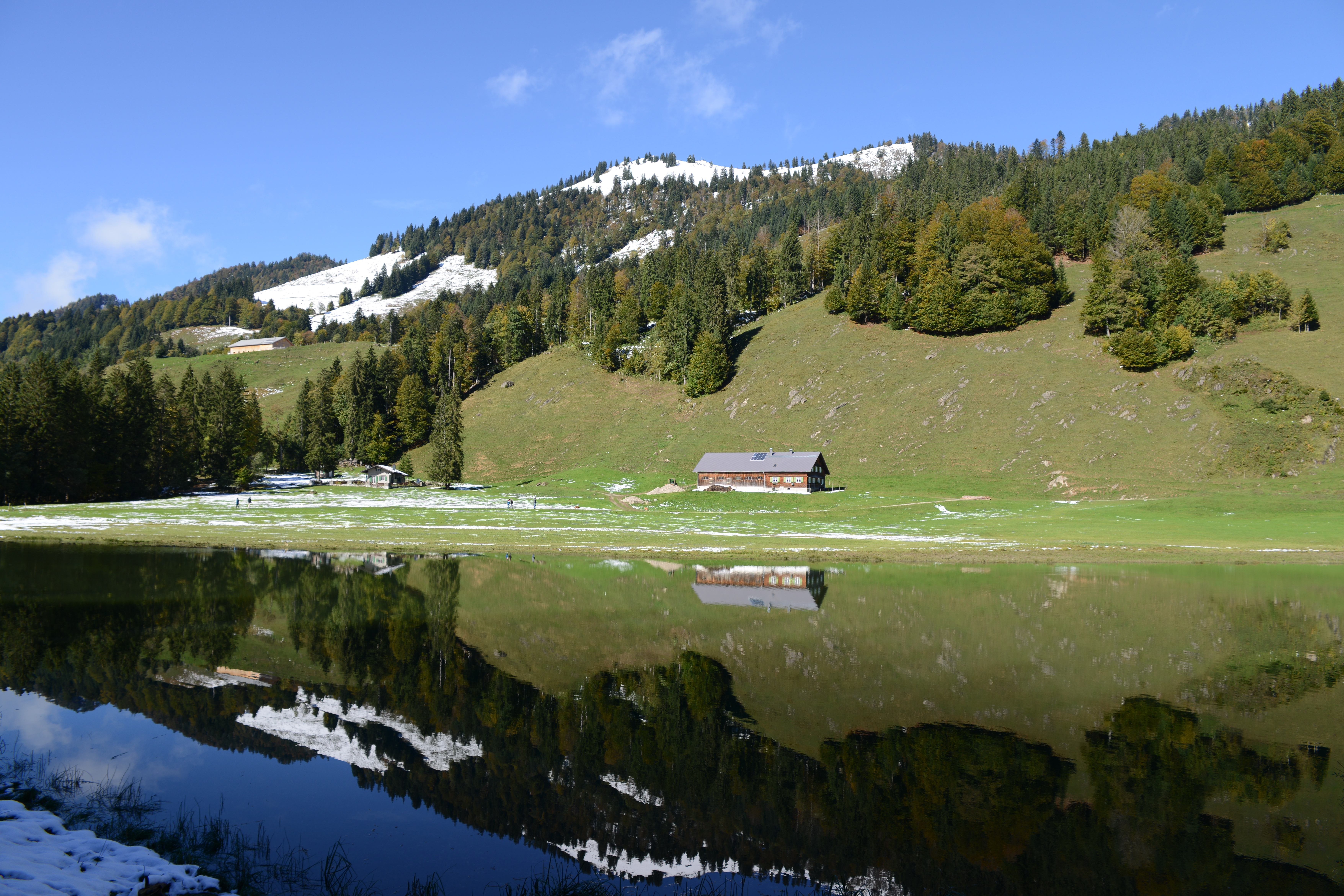 Beim Leckner See handelt es sich um einen Gebirgssee im Bereich der Molassezone. Der Leckner See liegt im Gemeindegebiet Hittisau auf einer Seehöhe von 1000 m und weist eine Fläche von 1,75 ha und eine maximale Wassertiefe von ca. 3 Metern auf.